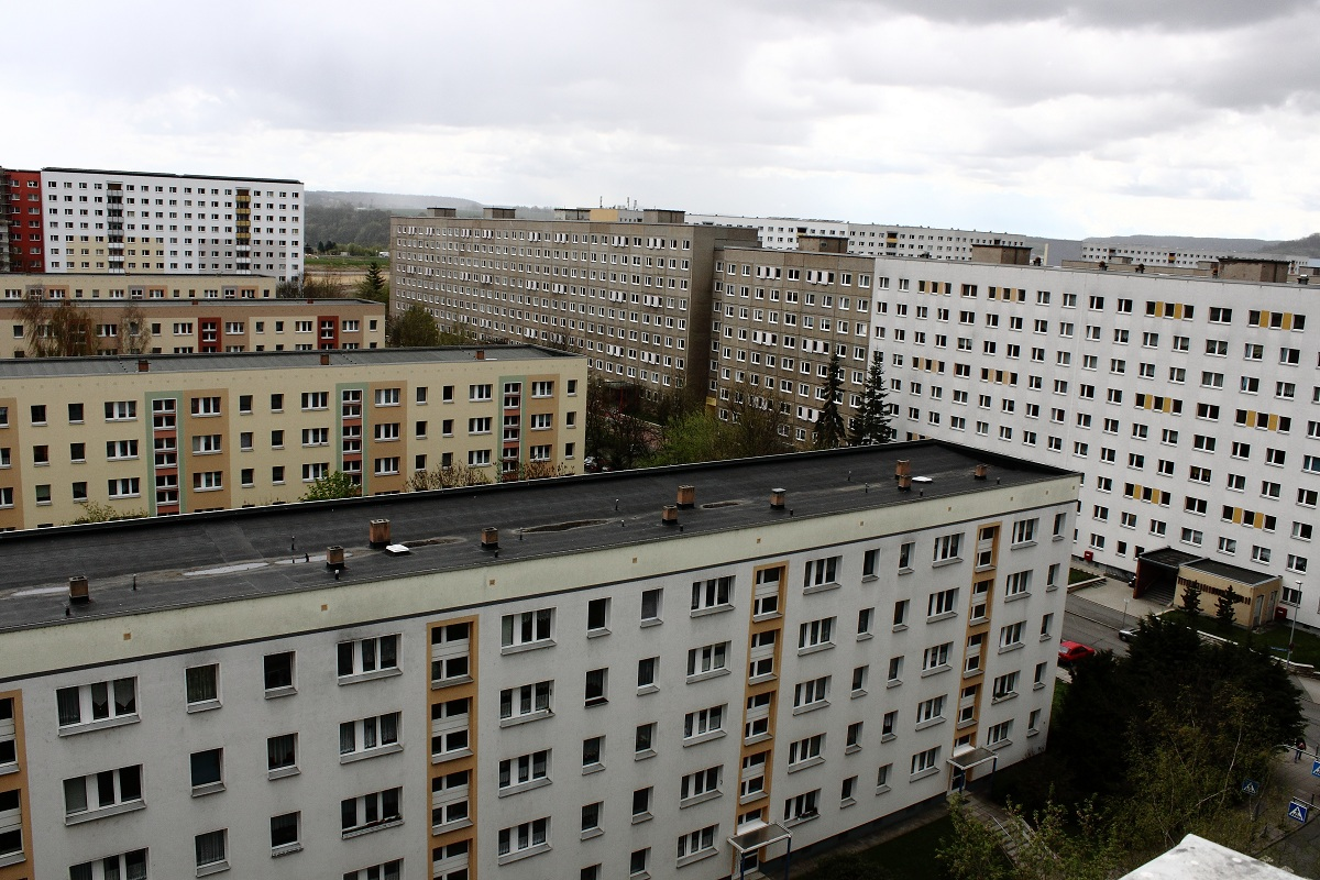 Lobedaer Plattenbau (Stadt Jena)